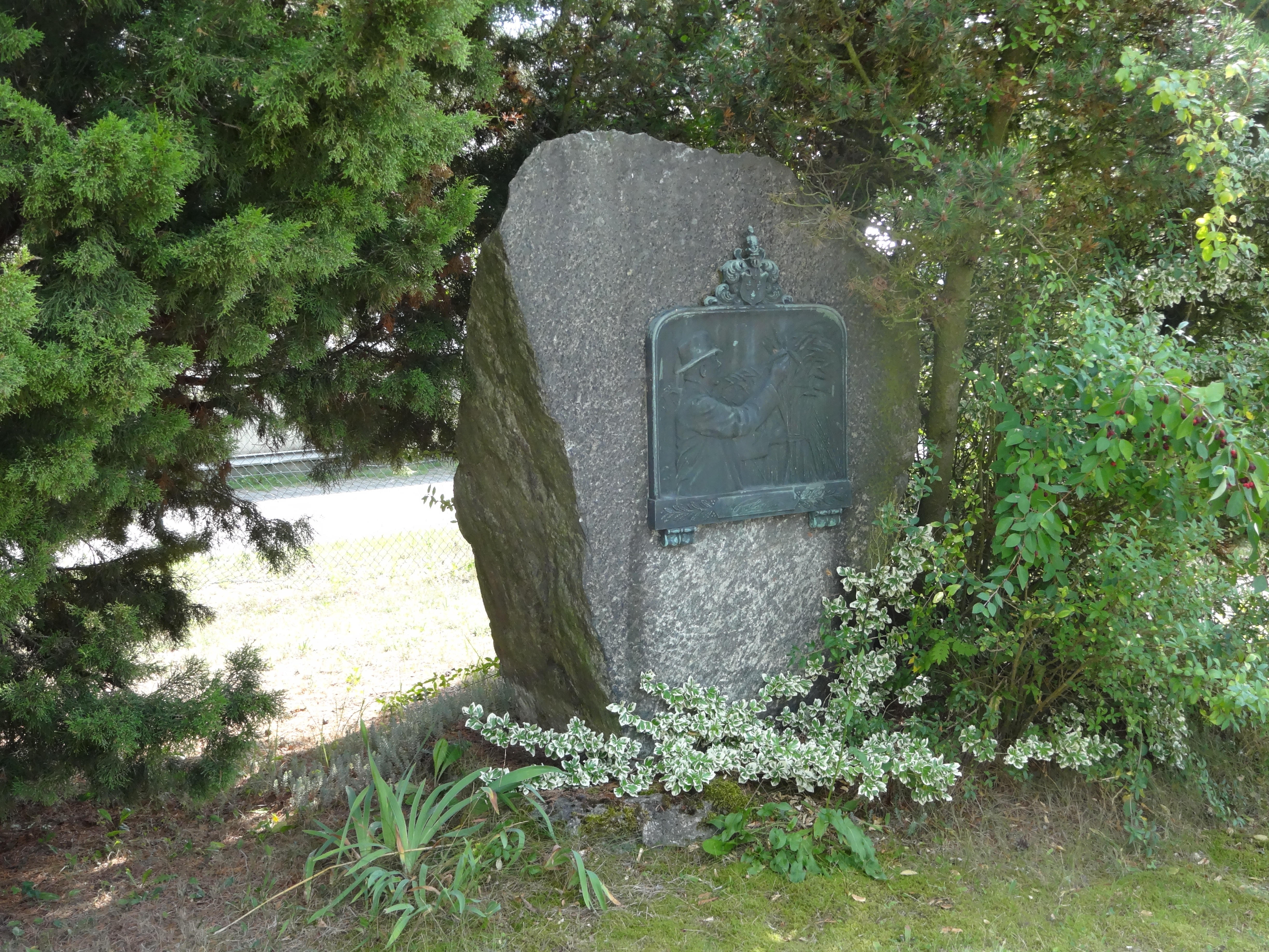 Gedenkstein Ferdinand von Lochow in Petkus; der Gedenkstein wurde von der DLG gestiftet und am 1. Juli 1926 eingeweiht. Unbehauener Findling mit Bronzeplatte von Bildhauer Dietzsch aus Sachsenhausen.